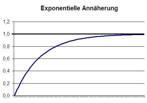 Exponentielle Annäherung (z.B. Temperaturverauf beim Erhitzen von Wasser); Formel f ( x ) = 1 − e − 0 , 5 x {\displaystyle f(x)=1-e^{-0,5x mit X=(0,[0,1],10); in EXCEL: =1-EXP(-0,5*Spalte mit x in entsprechenden Intervallen) (statt 0,5 kann man jeden beliebigen Faktor wählen)